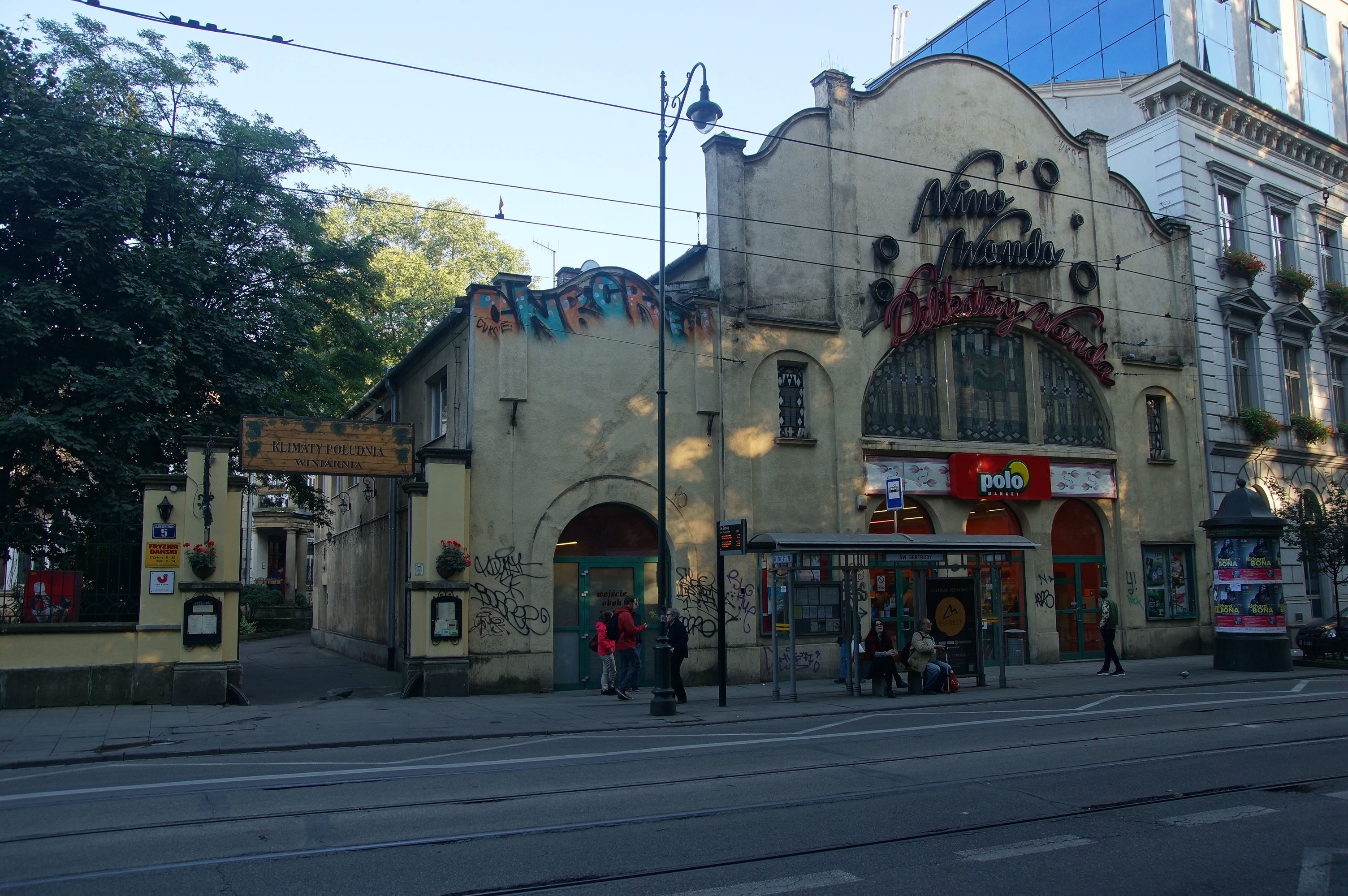 Kraków, budynek kina "Wanda", 1912